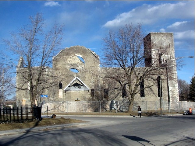 Ancienne église St-Paul d'Aylmer, Québec rasée par les flammes en 2010, secteur d'Aylmer, Gatineau, Qc. en Outaouais